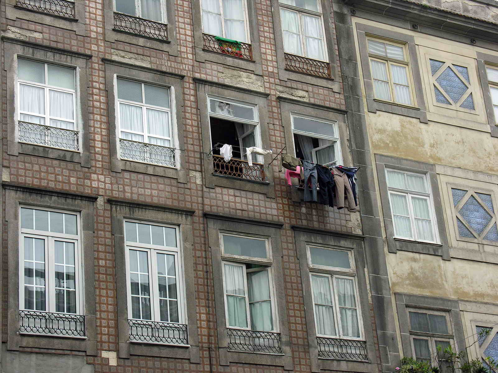 Rua de Mouzinho da Silveira. Em Portugal, Porto, Porto, Sé.